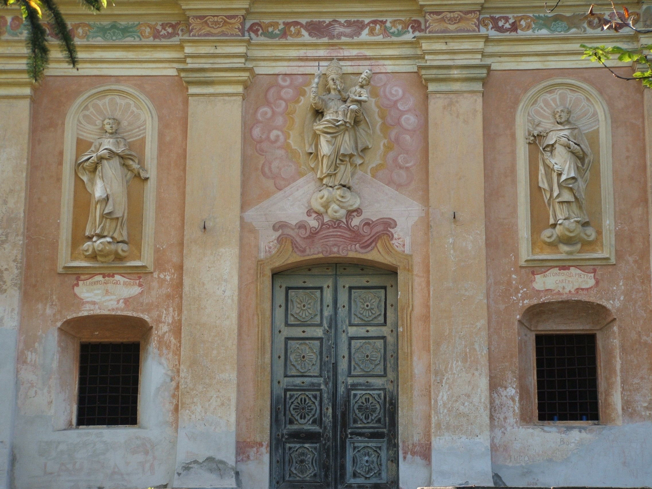 Santuario della Brugarola, ad Ailoche, comune in provincia di Biella, Piemonte, Italia)